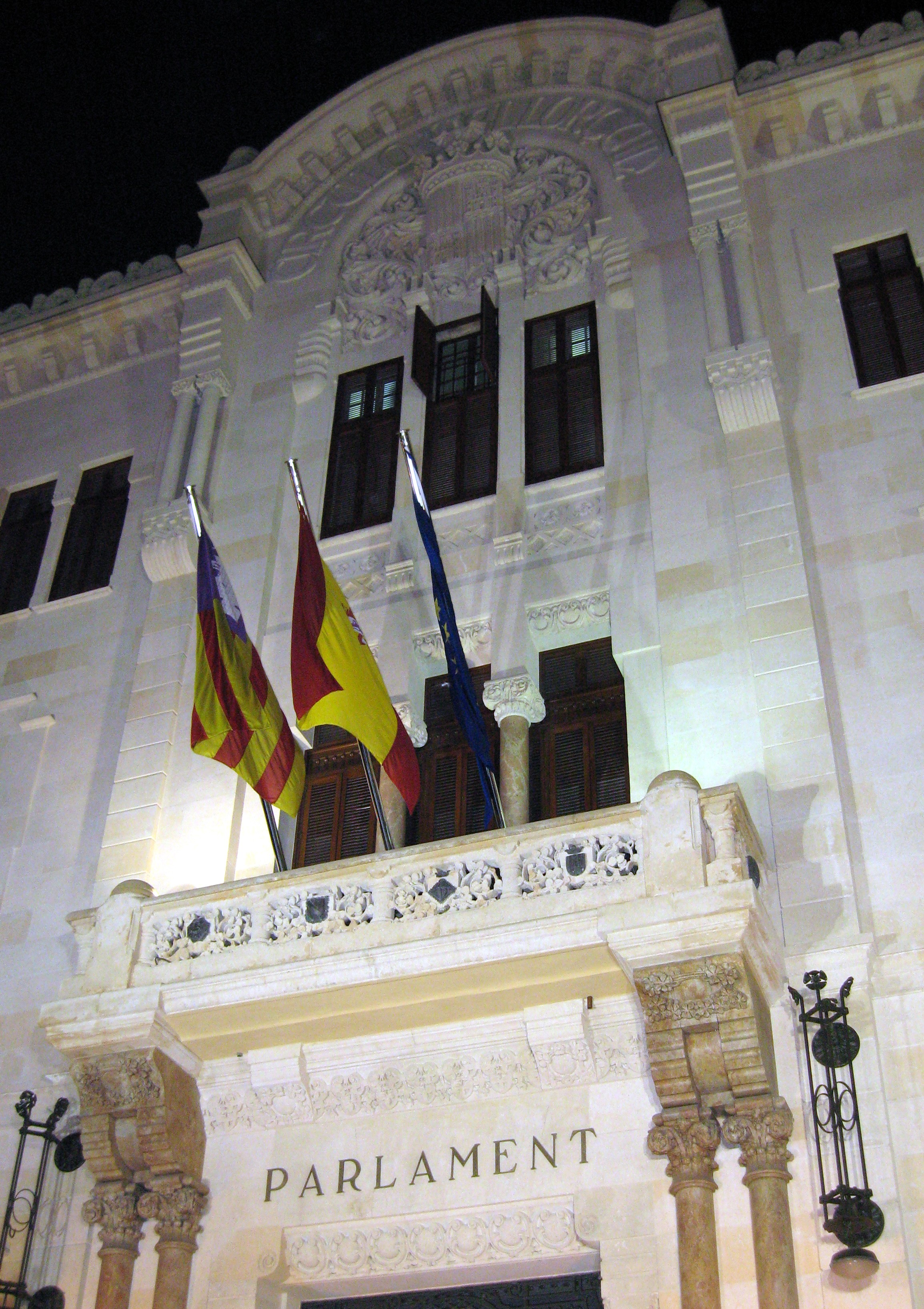 Parlament in Palma de Mallorca, Mallorca, Spain